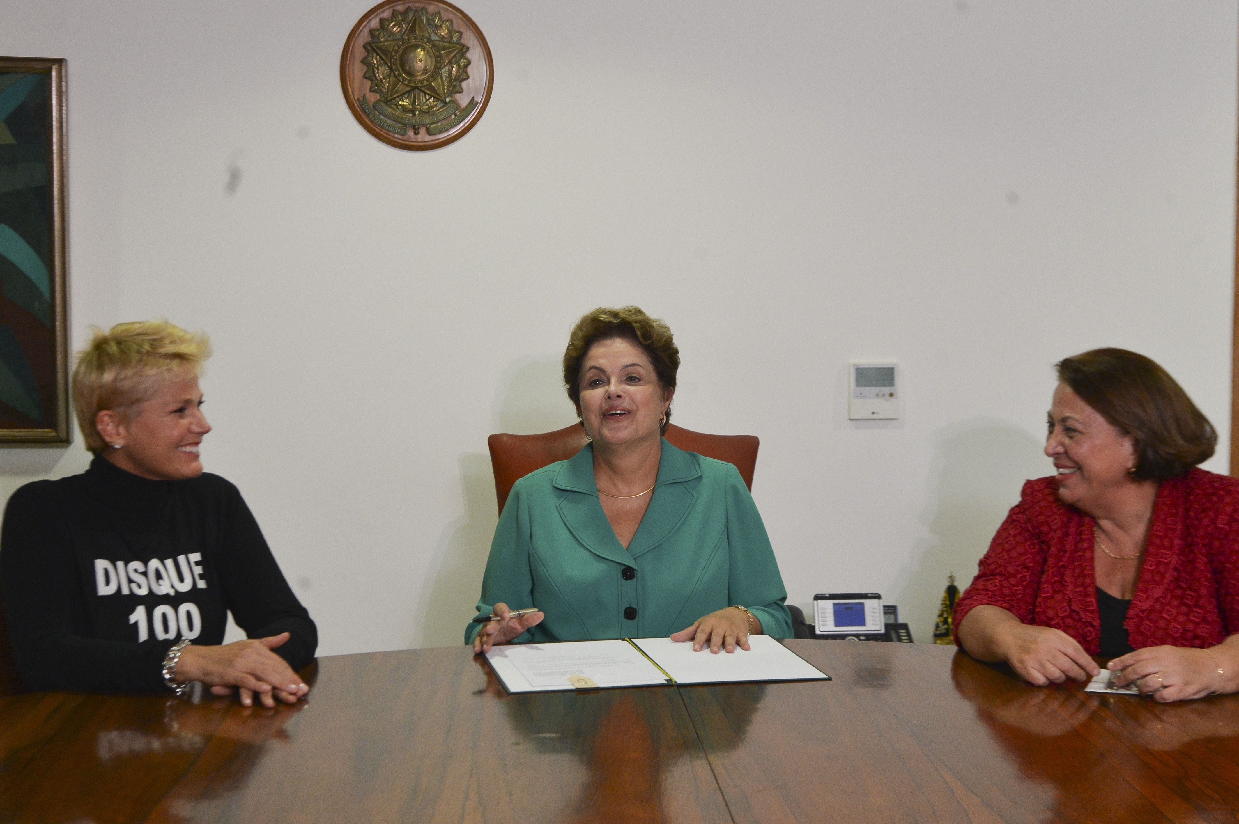 Sancionada lei que torna crime hediondo abuso infantil